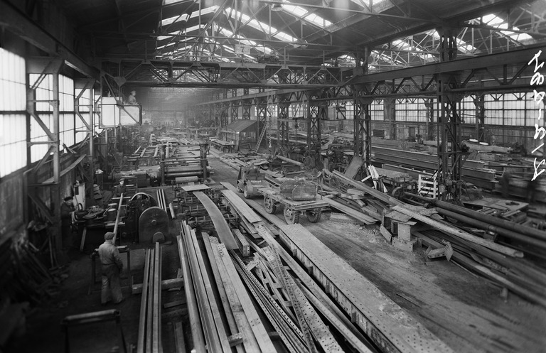 Alkuperäinen kuvaus: OY Wärtsilä - yhtymä AB, Kone ja Silta. Sisäkuva siltaverstaasta.